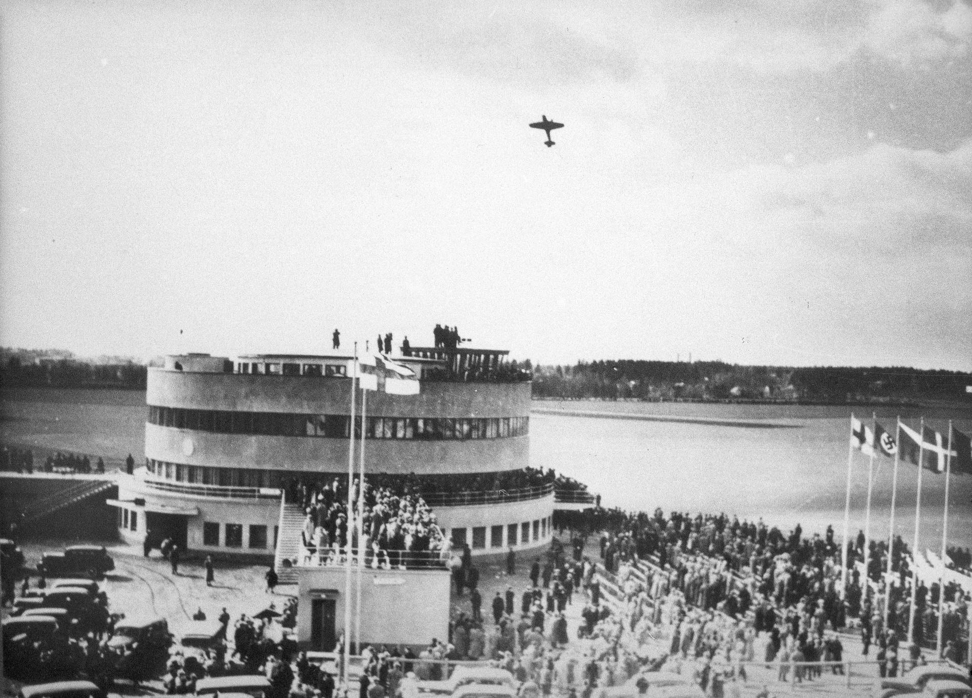 Malmin lentokentän vihkiäiset 1938